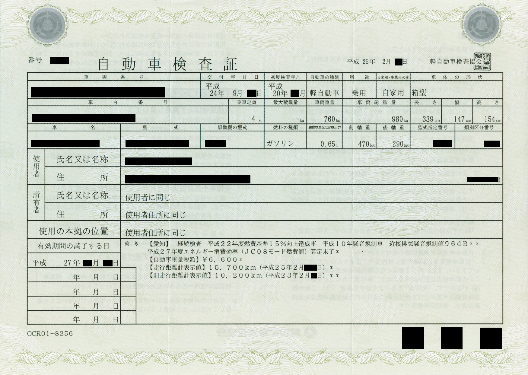 自動車検査証（軽自動車検査協会発行）